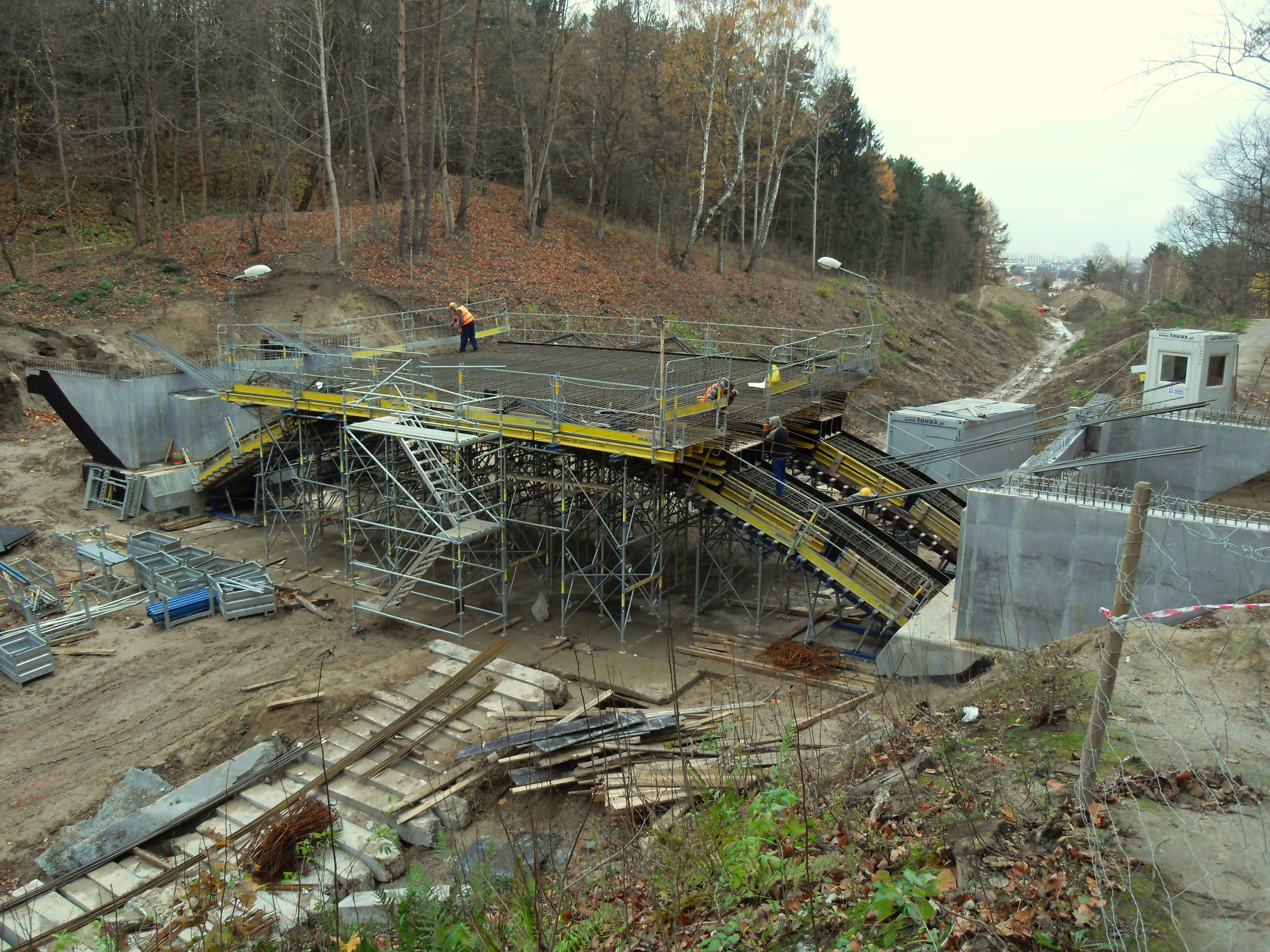 Gdańsk Strzyża, nowy wiadukt Weisera. Pomorska Kolej Metropolitalna w budowie.